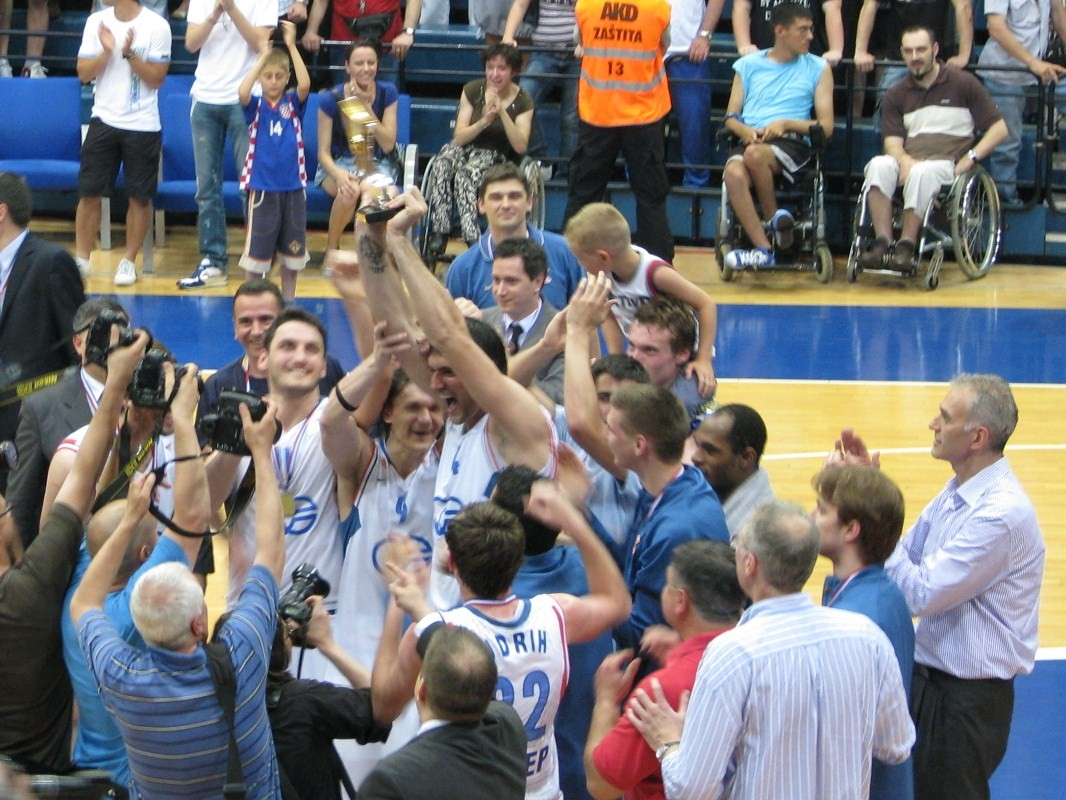 Cibona slavi naslov prvaka Hrvatske 2010.